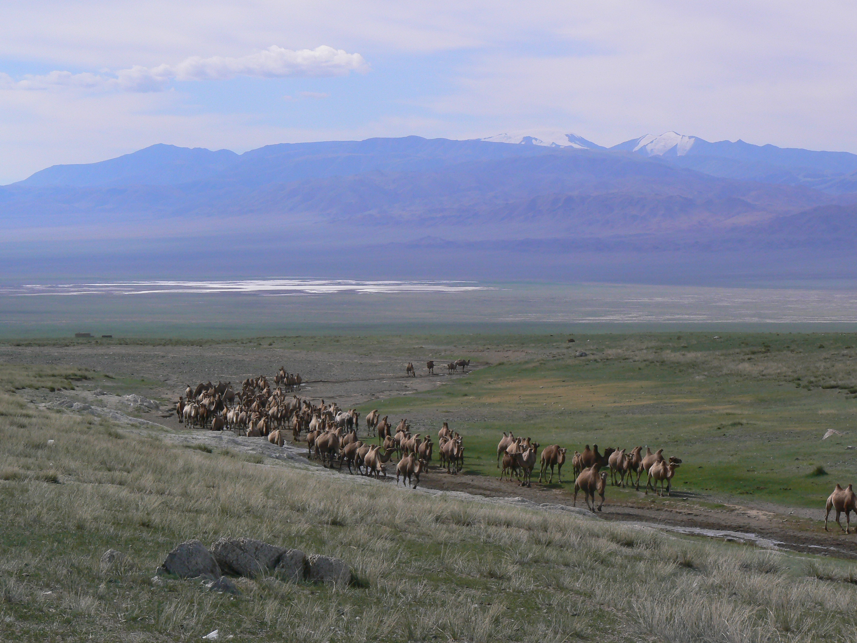 Верблюды на водопое. Монгольский Алтай